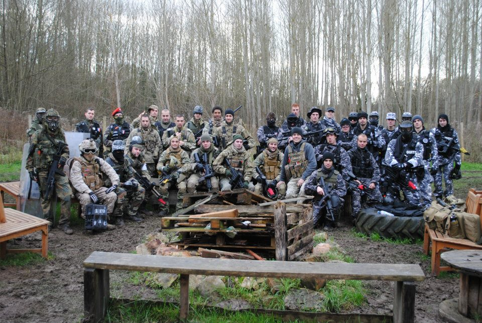 Joueurs camo